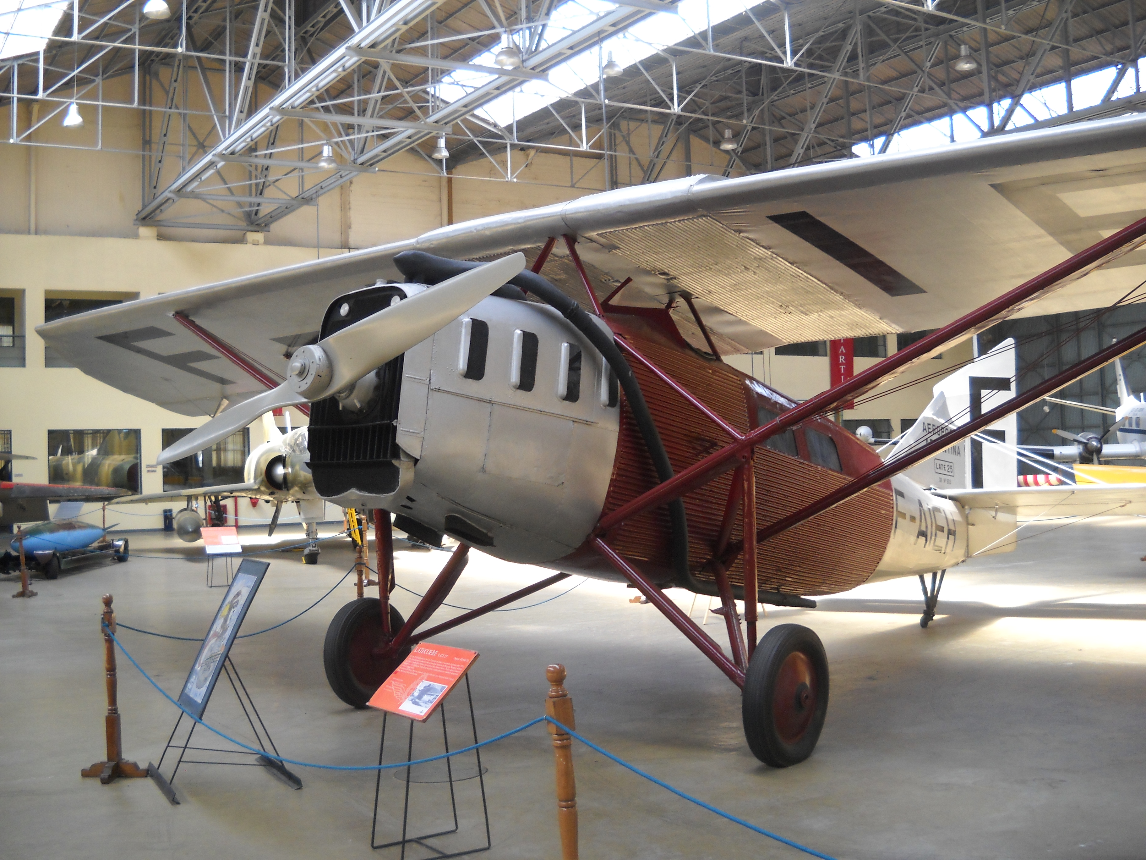 Latecoere 25